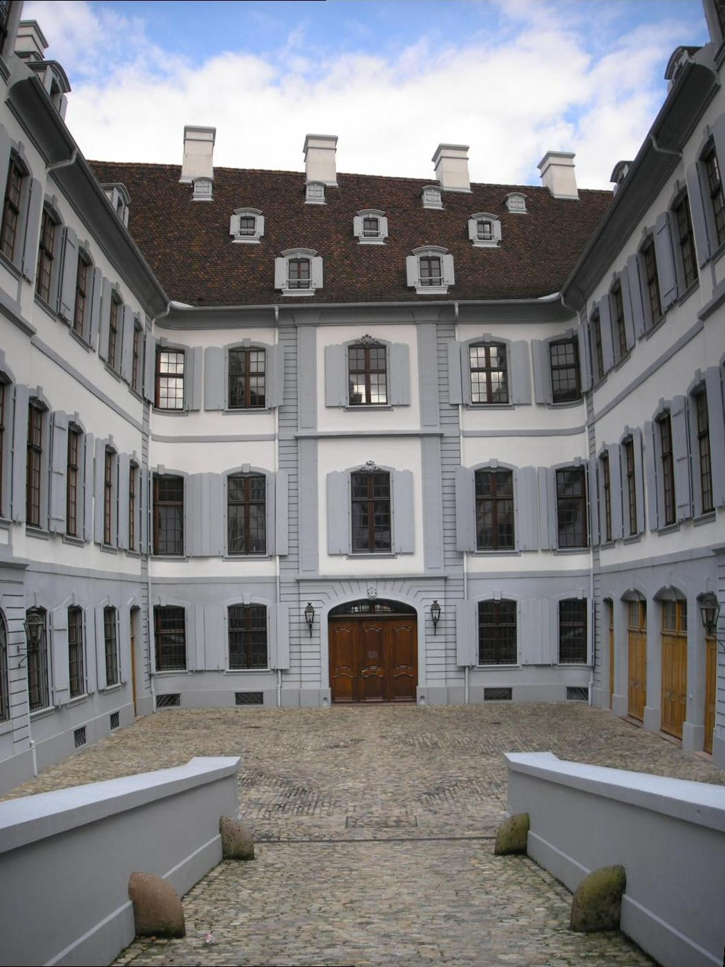 Weisses Haus. (Wendelstörferhof) erbaut 1762-68 von Samuel Werenfels (1720-1800) als Wohn- und Geschäftshaus für den Seidenbankfabrikanten Jakob Sarasin. Heute Sitz der Vormundschaftsbehörde.